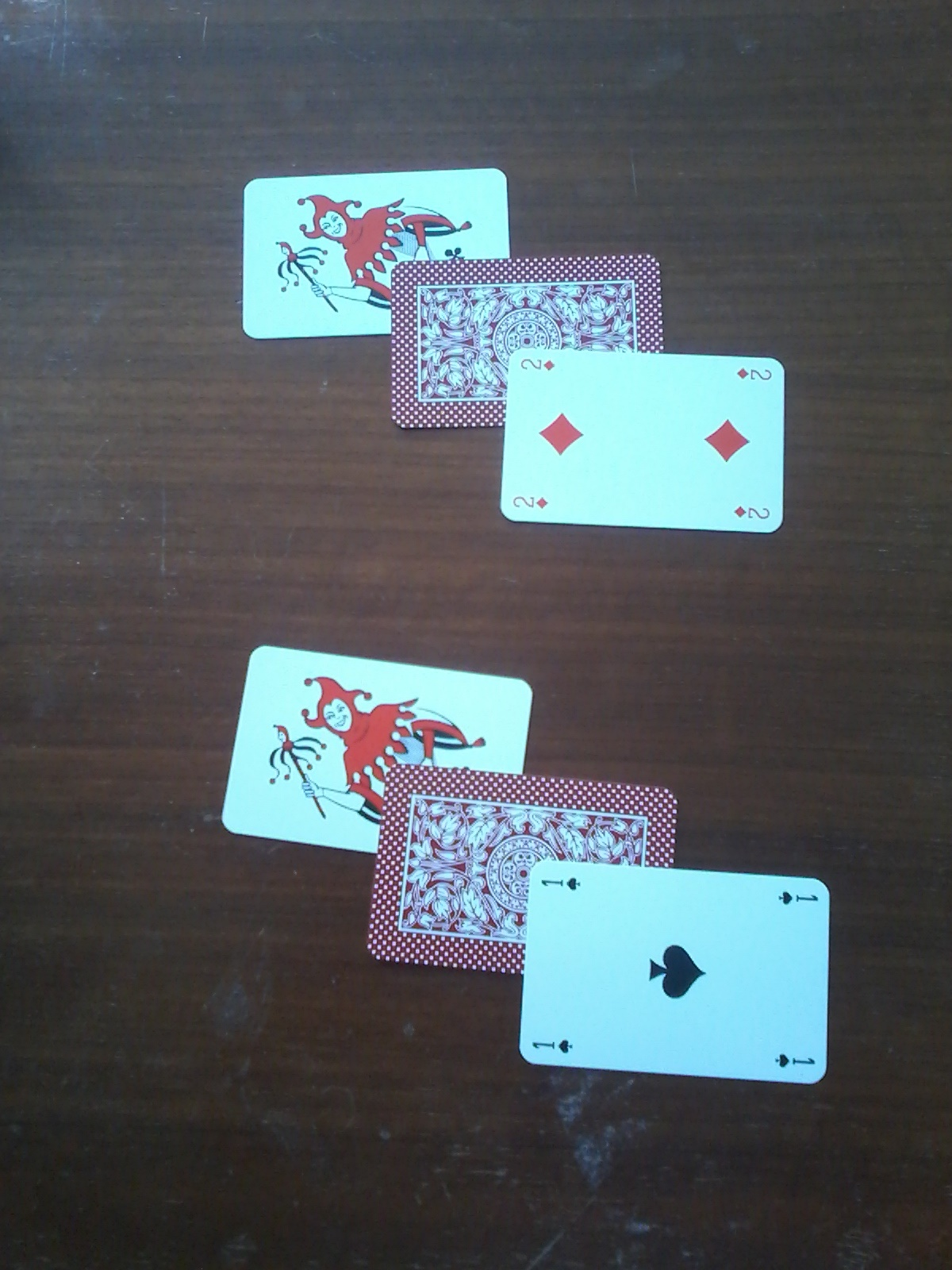 Chaque joueur a joué un joker, puis a placé une carte retournée, puis une carte suivante : un 2 ou un As.